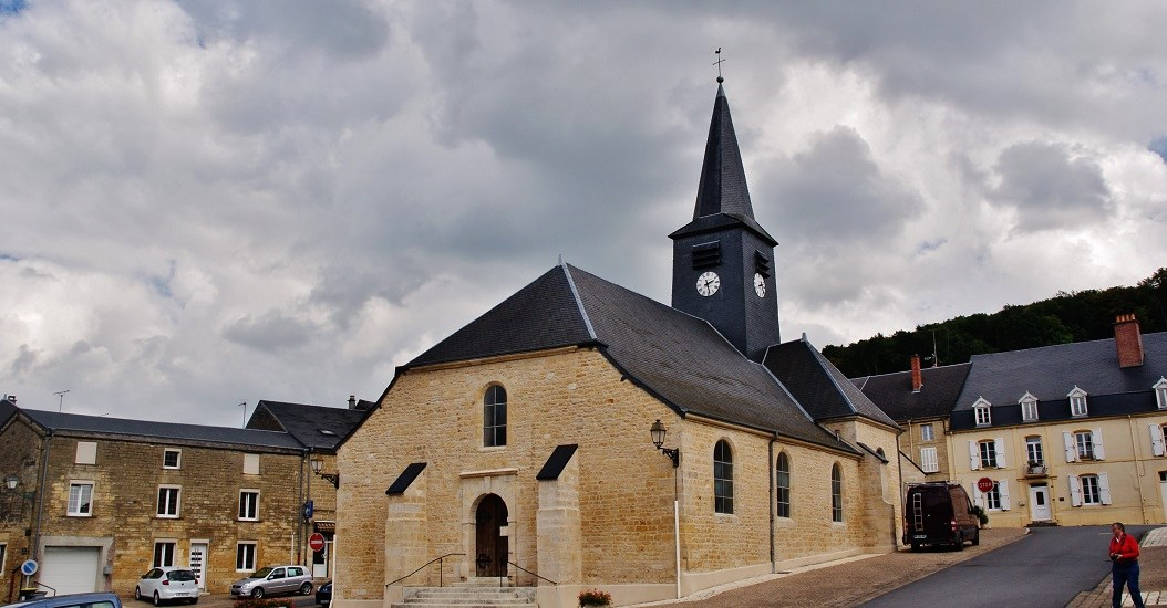 église St Nicaise